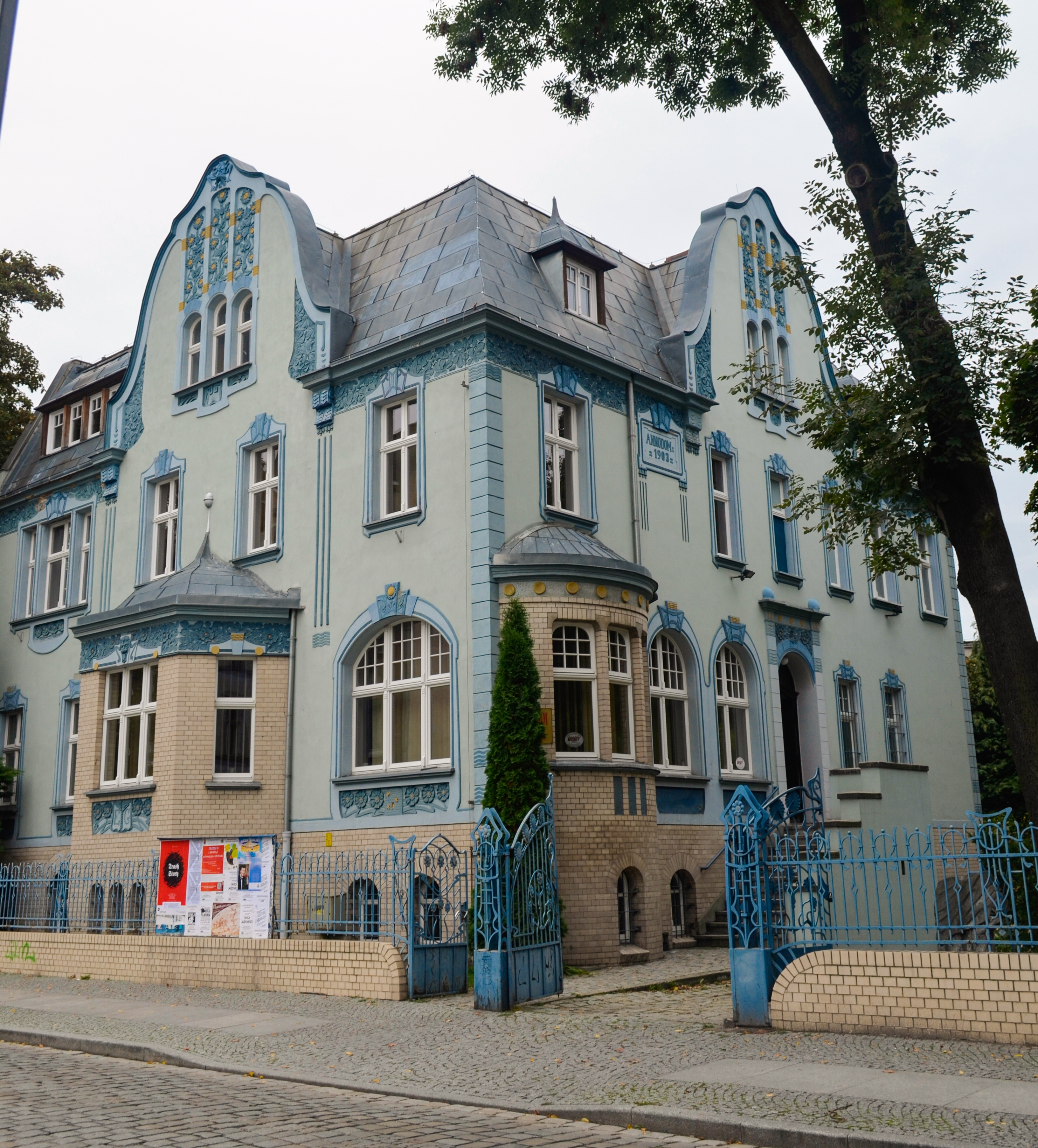 Żary, dom, ob. dom kultury, 1903